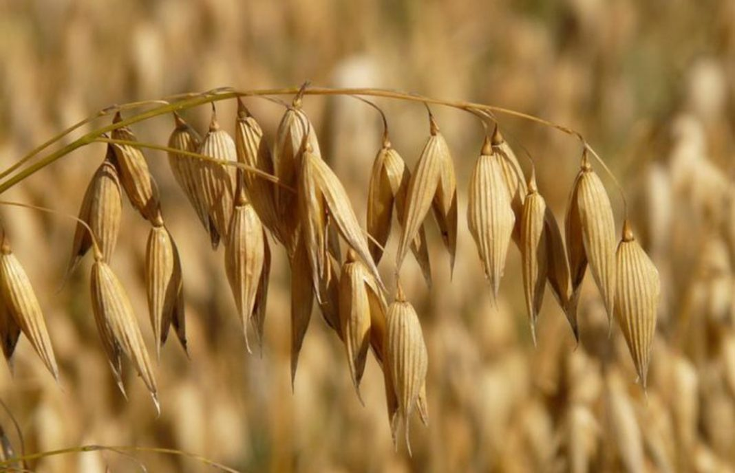 Frutos de la tierra